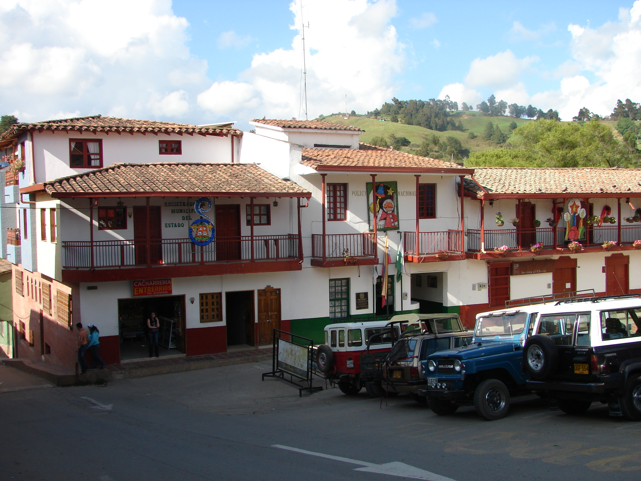 Parque del Municipio de Entrerríos. Antioquia, Colombia.